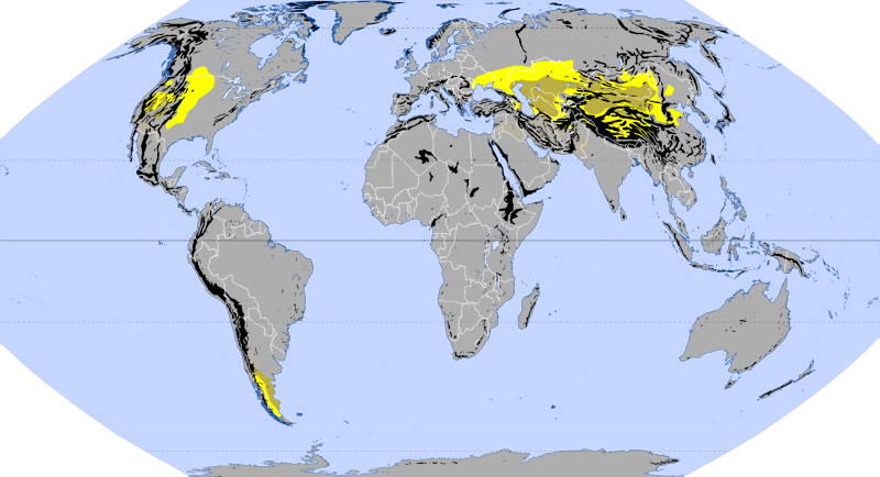 Auszug der Karte Ökozonen nach Jürgen Schultz